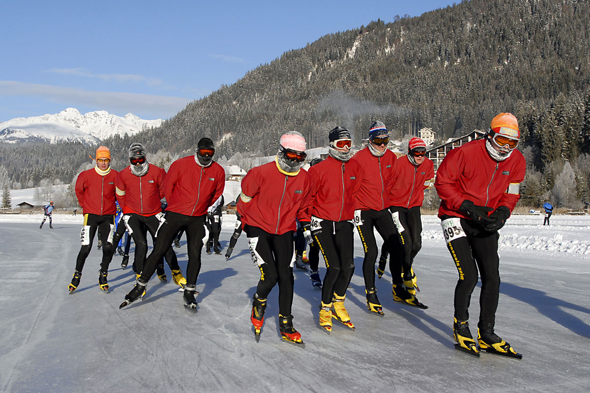 Sfeerbeeld van toertocht 2010